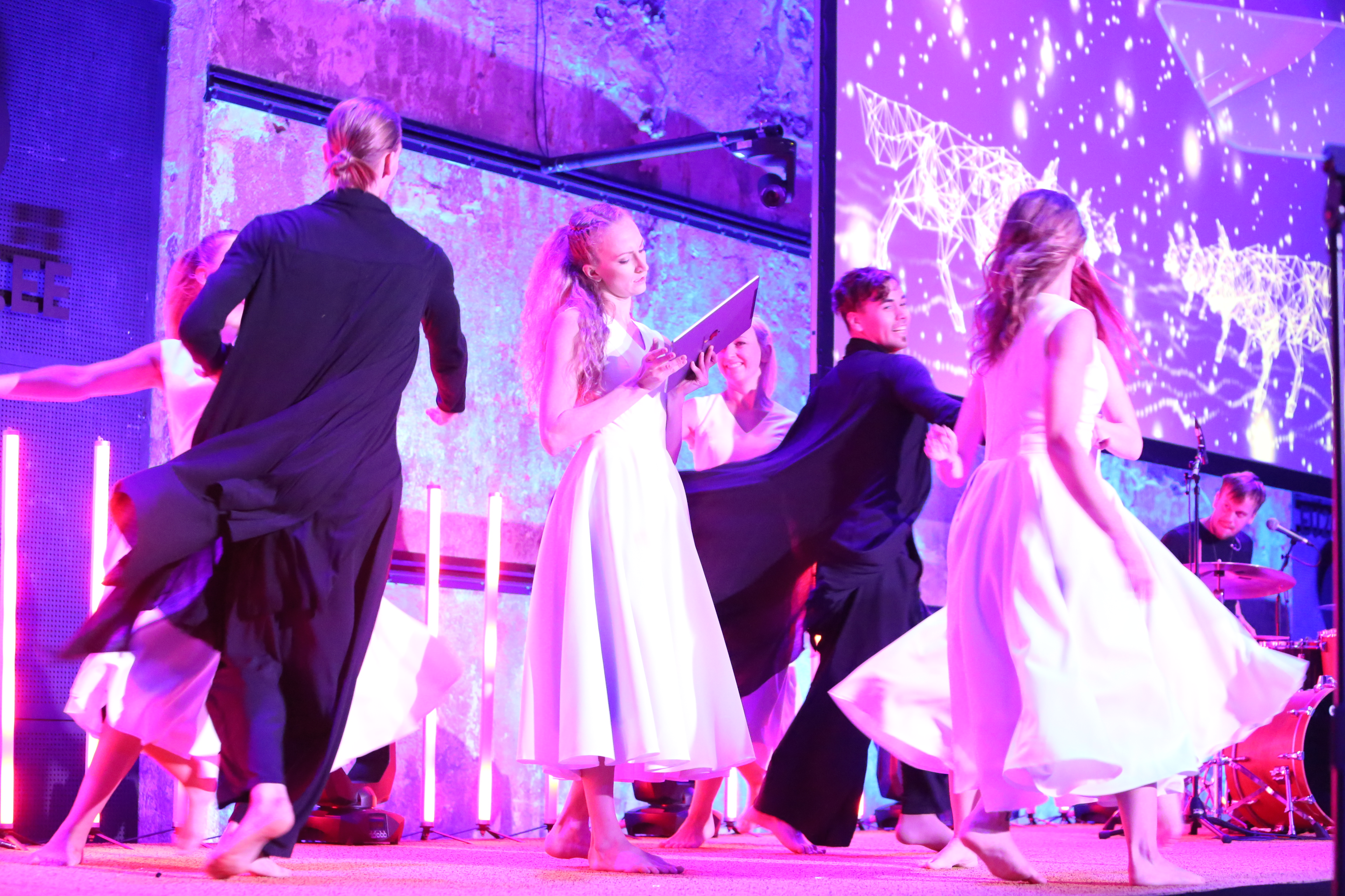 Photo: Annika Haas (EU2017EE)